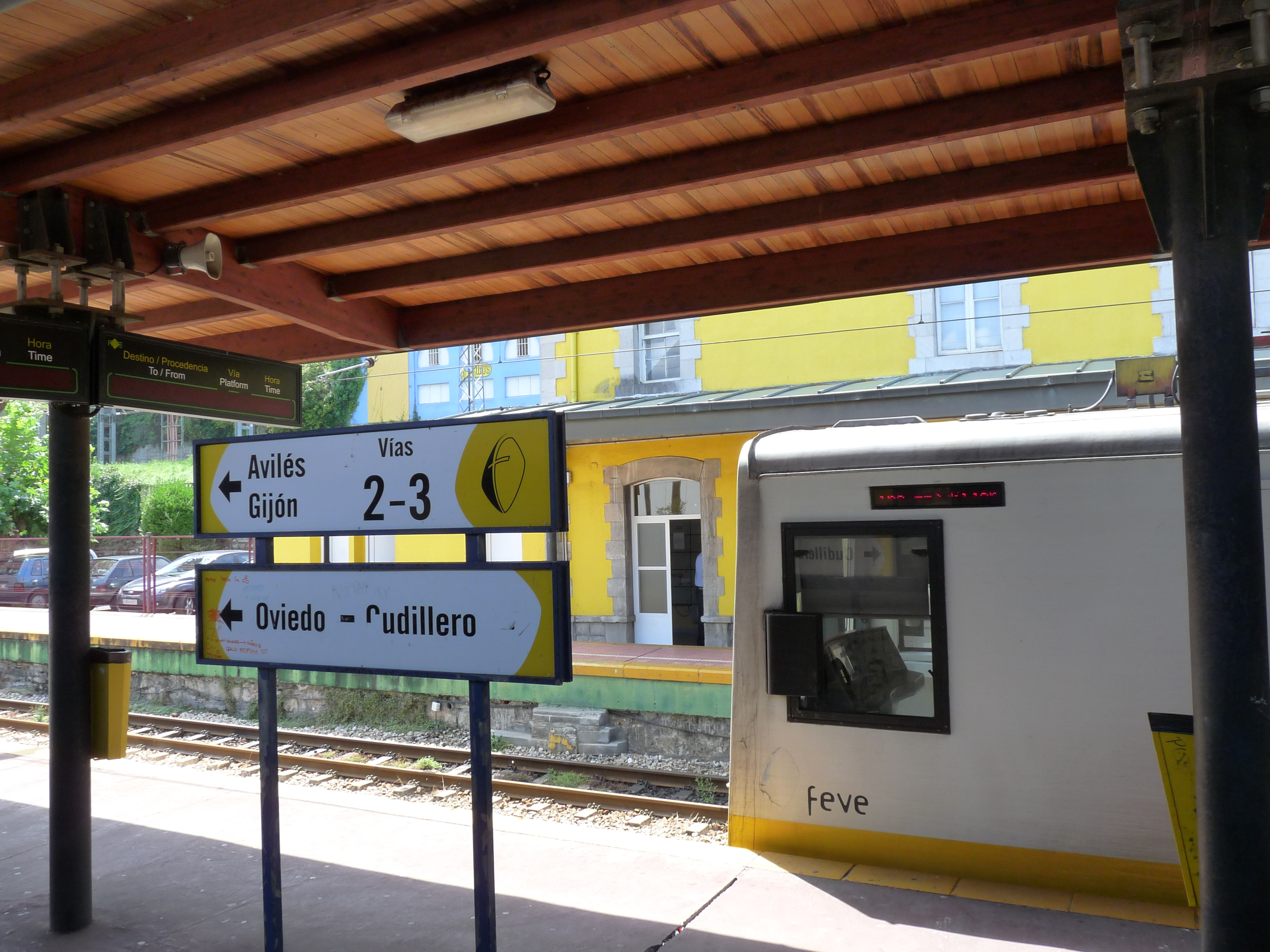 Overstapstation Pravia